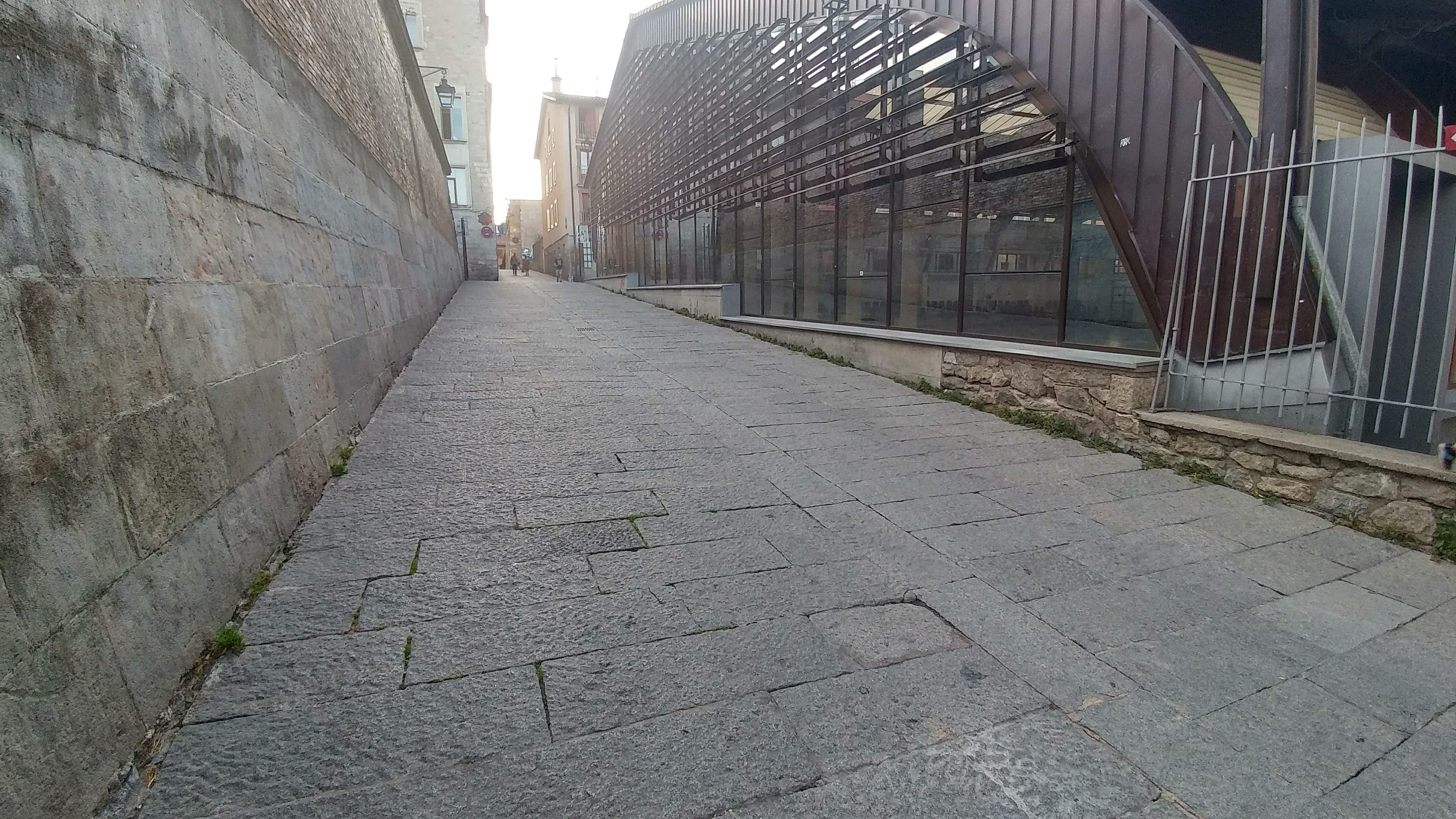 Gasteizko Alde Zaharreko kalea